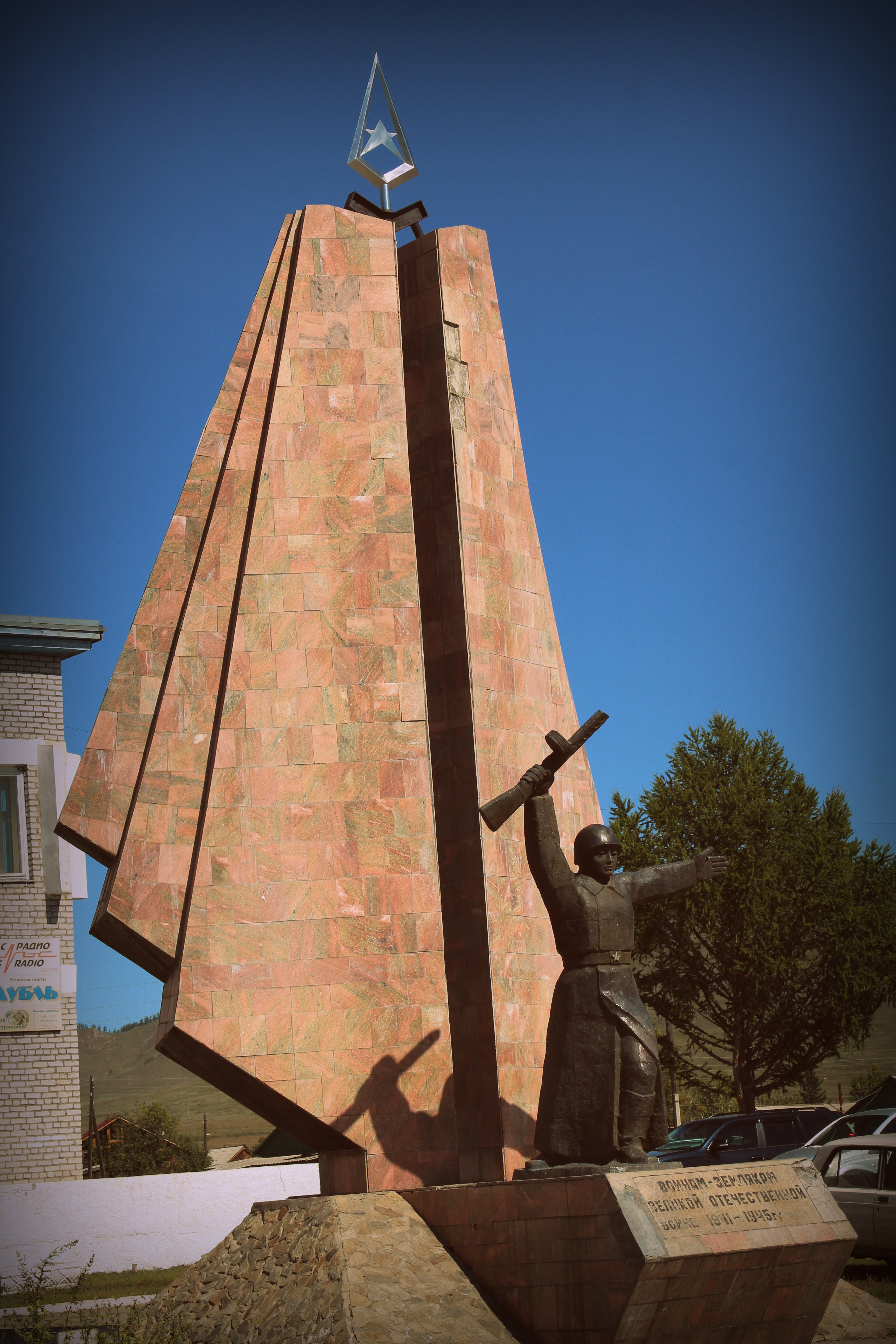 Памятник воинам-землякам в Петропавловке. Джидинский район Бурятии